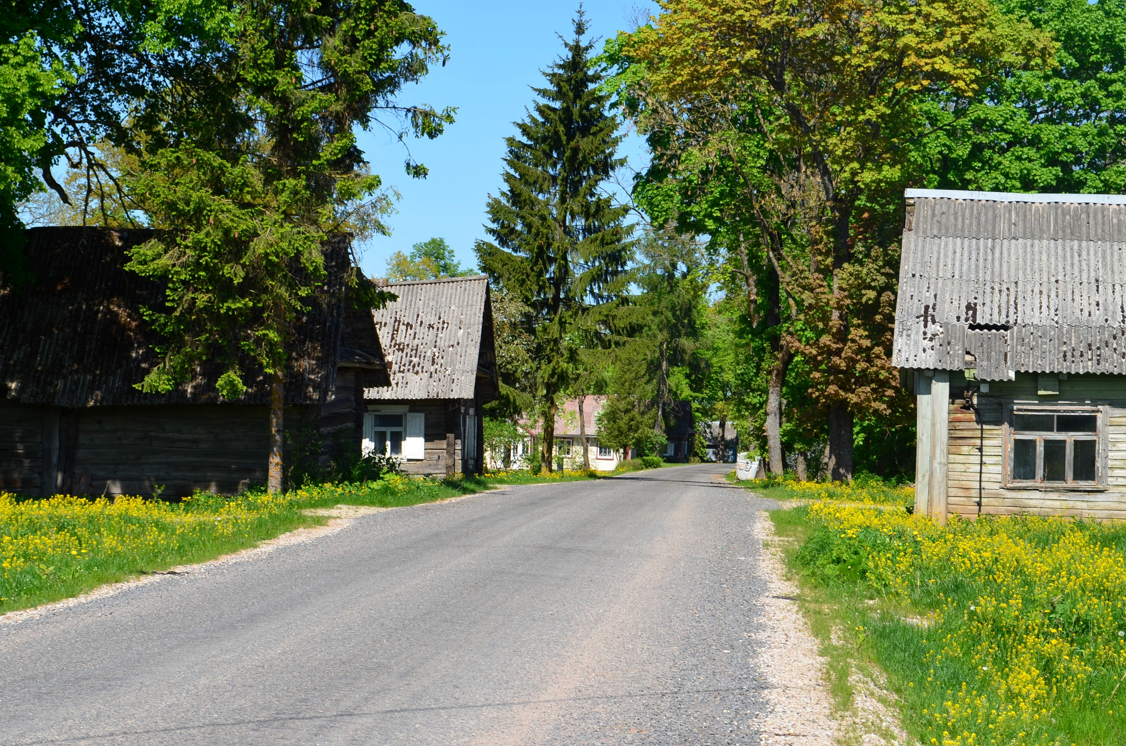 Pravydžiai, Kavarsko sen., Anykščių raj.